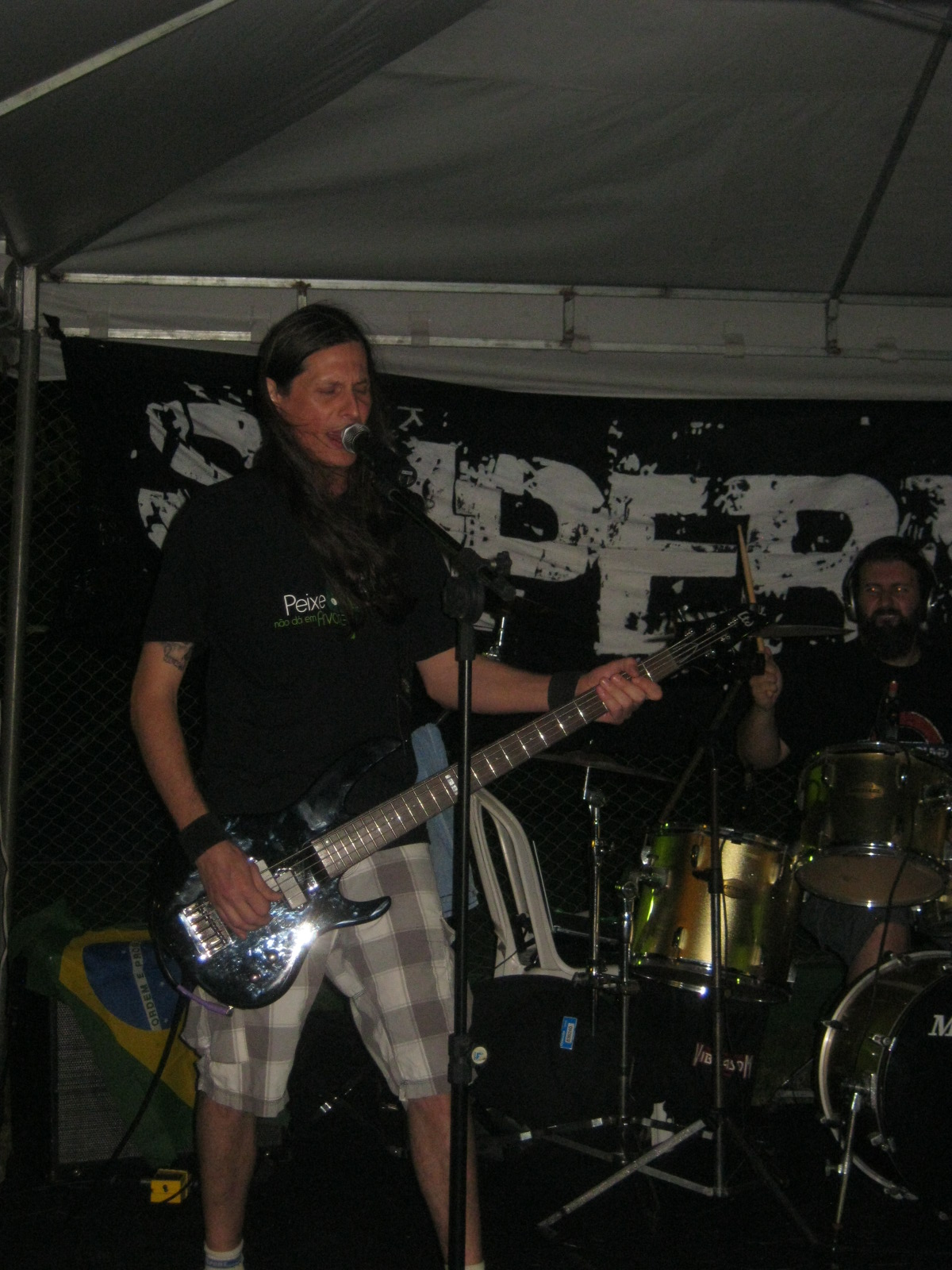 Rogener Pavinski, bajista y cantante de Supernova y redactor de la revista Kontakto, durante un concierto de Supernova en el Congreso Internacional de Jóvenes Esperantistas de 2014Esperanto: Rogener Pavinski, basgitaristo kaj kantisto de Supernova kaj redaktoro de la revuo Kontakto, dum konzerto de Supernova dum la IJK 2014